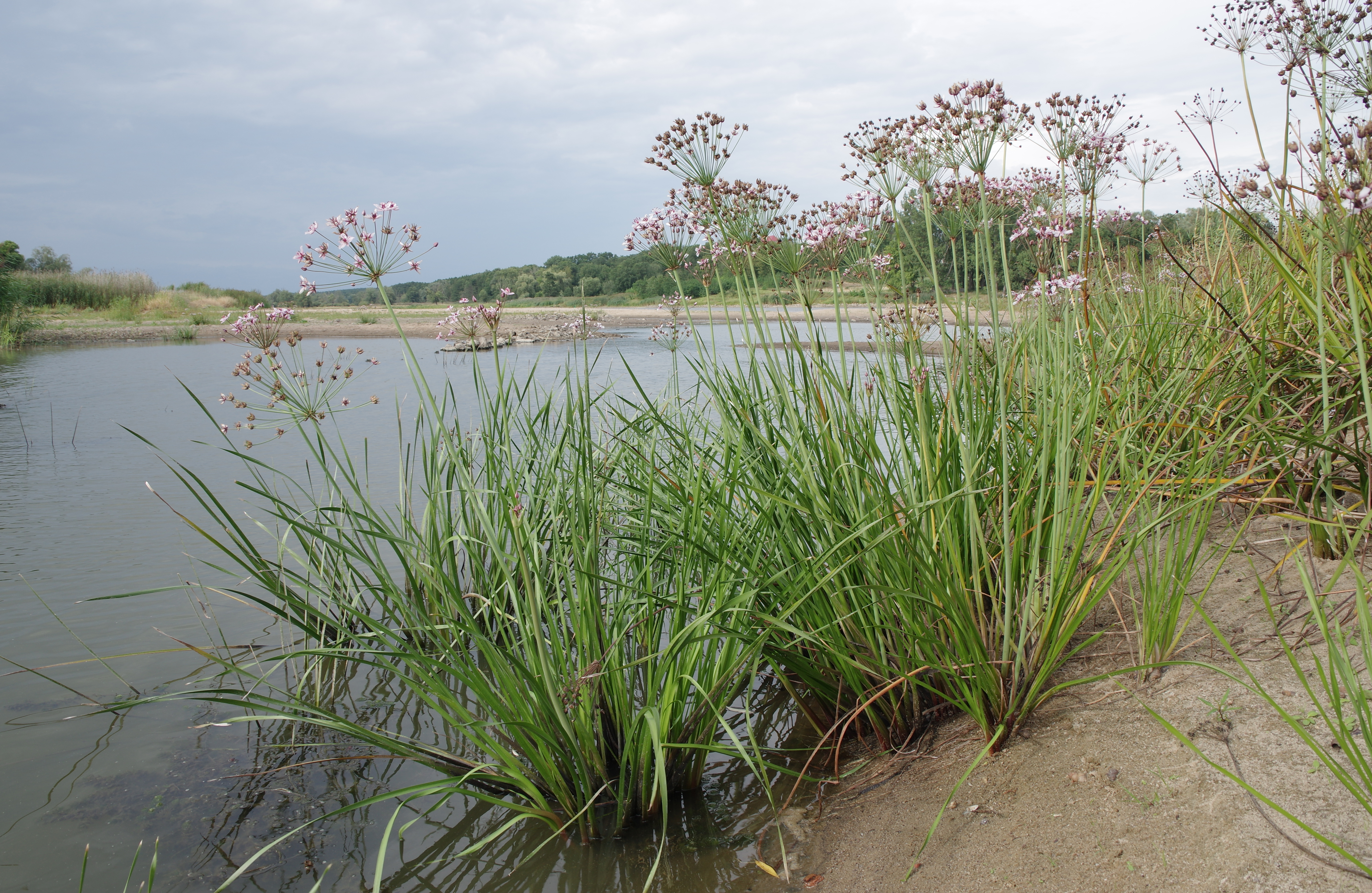 Altlauf der Oder bei Niedrigwasser mit Pionierfluren und Kleinröhrichten – hier Schwanenblumen (Butomus umbellatus) – im NSG und FFH-Gebiet „Odervorland Gieshof“, Oderbruch (Lkr. Märkisch-Oderland, Brandenburg). Bestandteil des EU-Vogelschutzgebiets „Mittlere Oderniederung“.